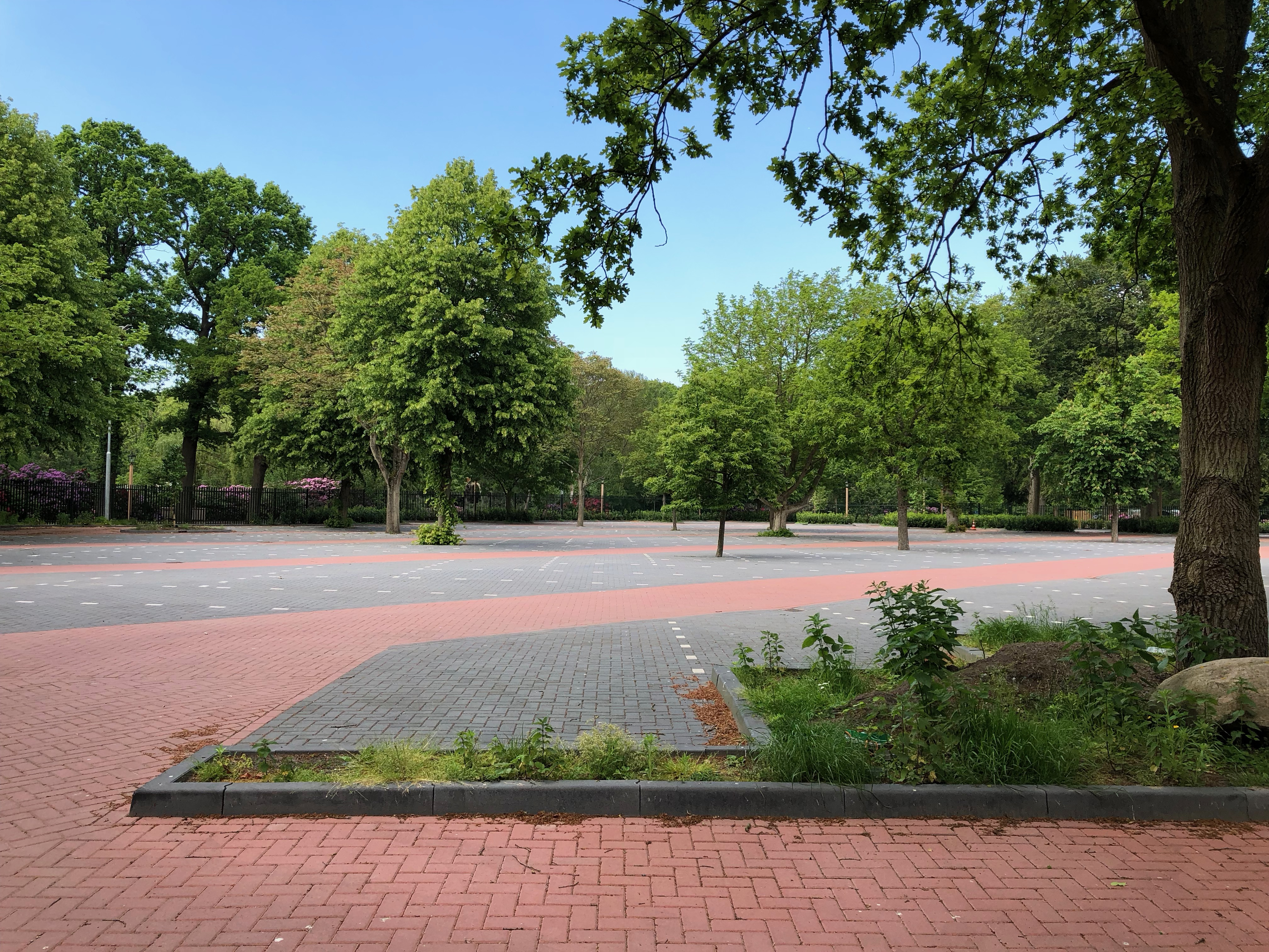 Duinrell